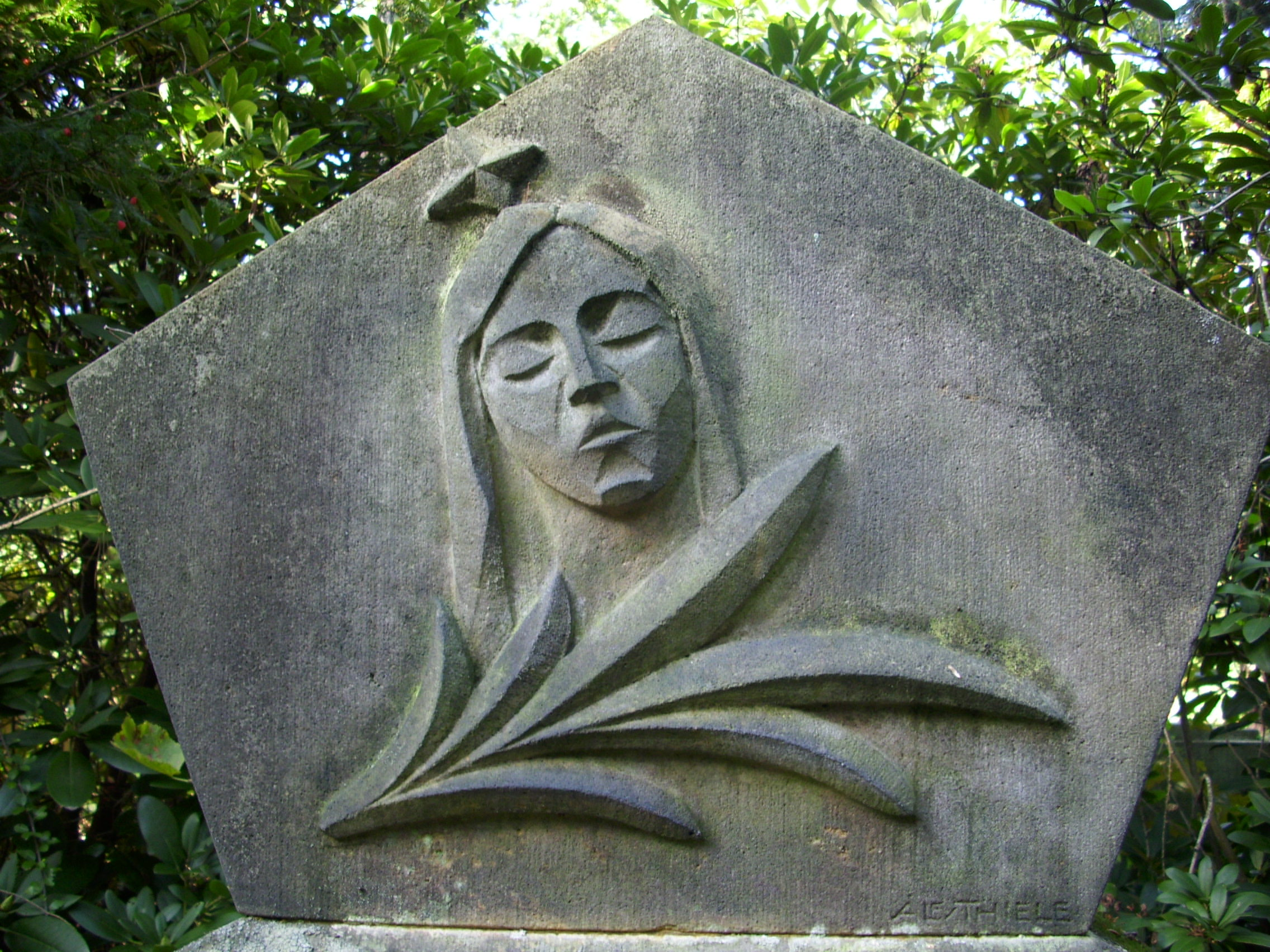 Alfred Thiele: Detail Grabmal Kraatz, Sandstein, Südfriedhof Leipzig